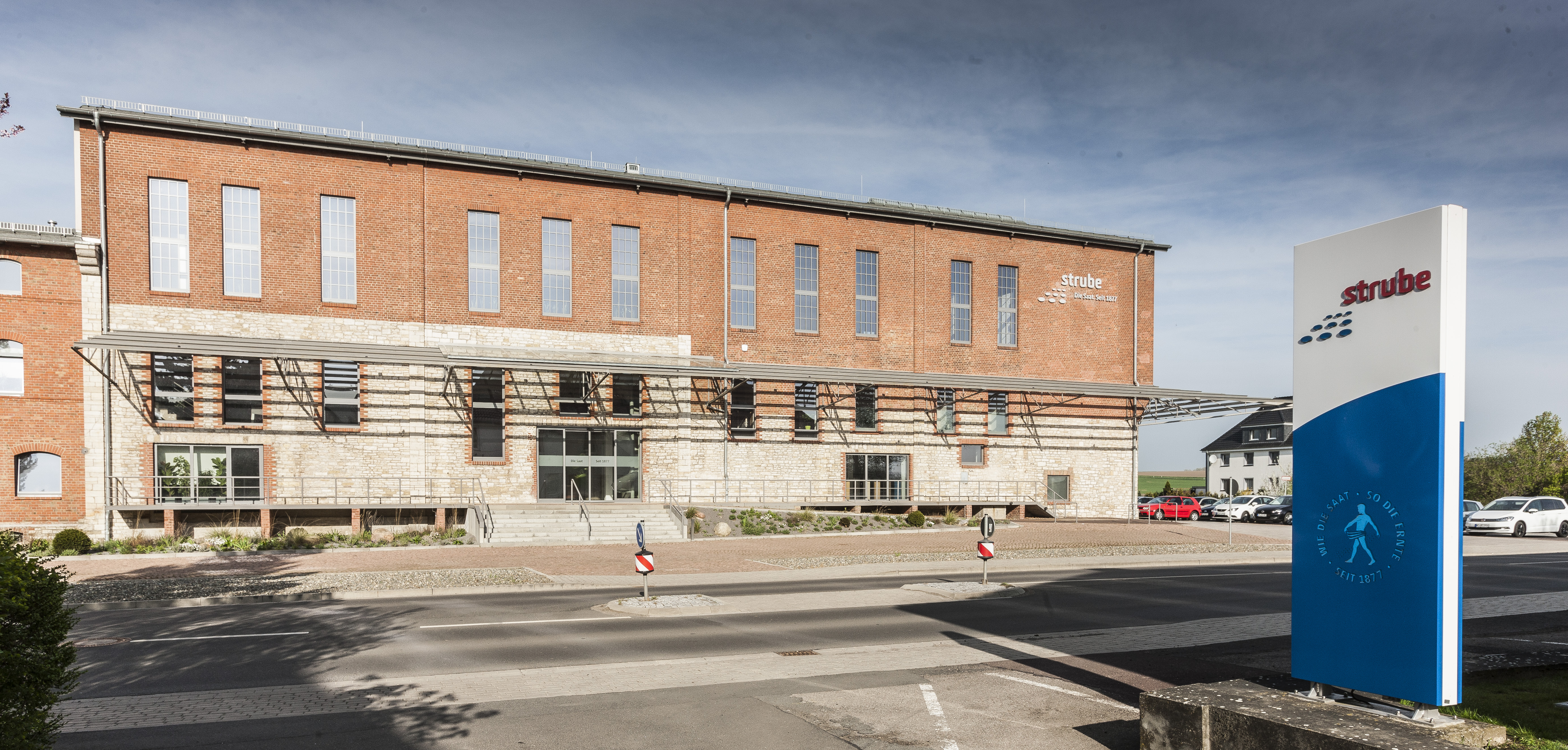 Unternehmenszentrale der Strube D&S GmbH in Söllingen, Niedersachsen.